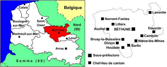 Carte de l'arrondissement de Béthune (62) avec chefs-lieux de cantons Utilisateur:Manchot sanguinaire